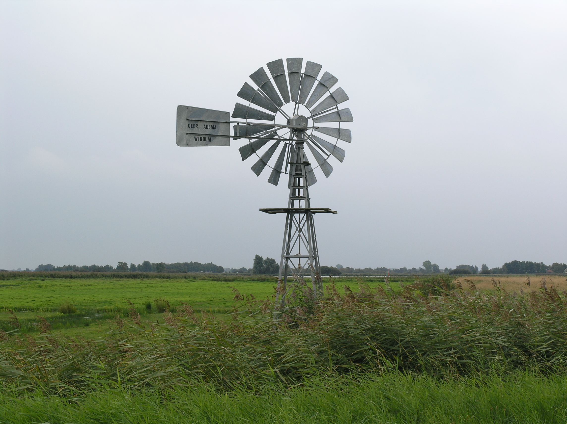 Oudega Windmotor Barfjild